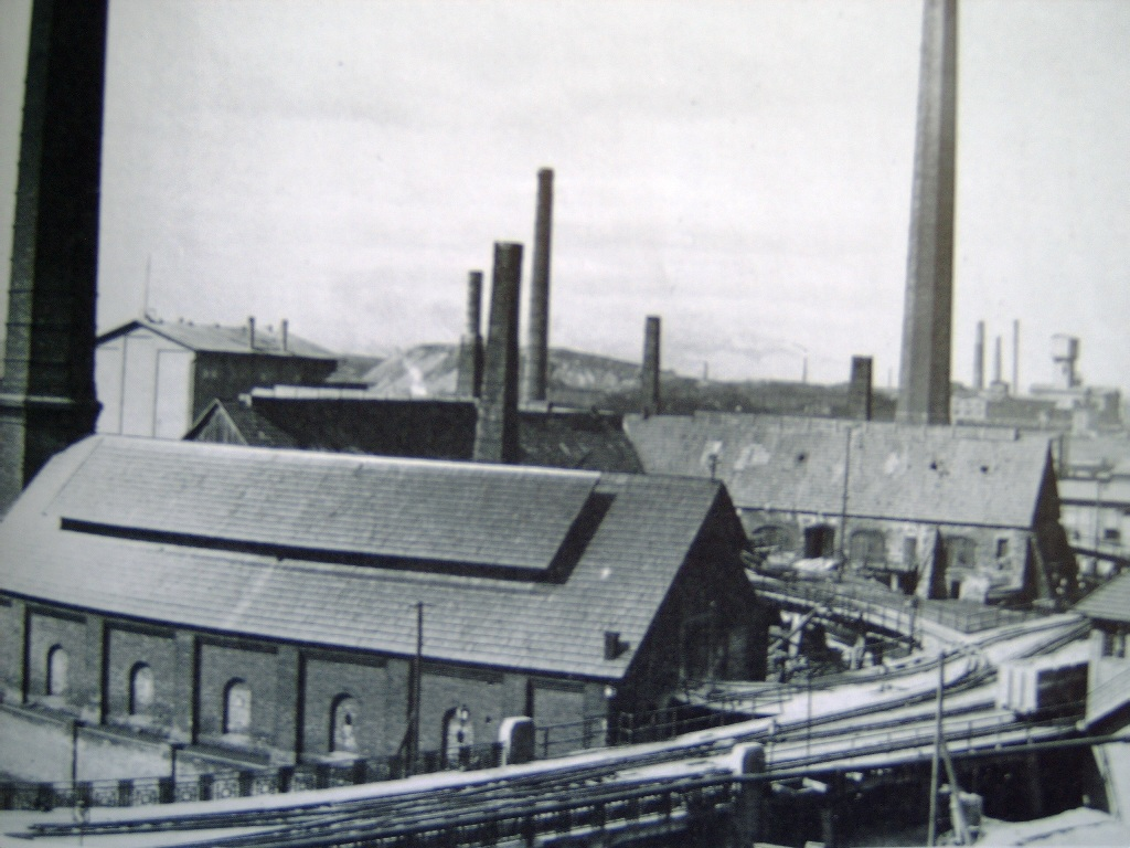 Huta cynku "Paweł" w Katowicach-Dąbrówce Małej (zdjęcie z 1900 roku)